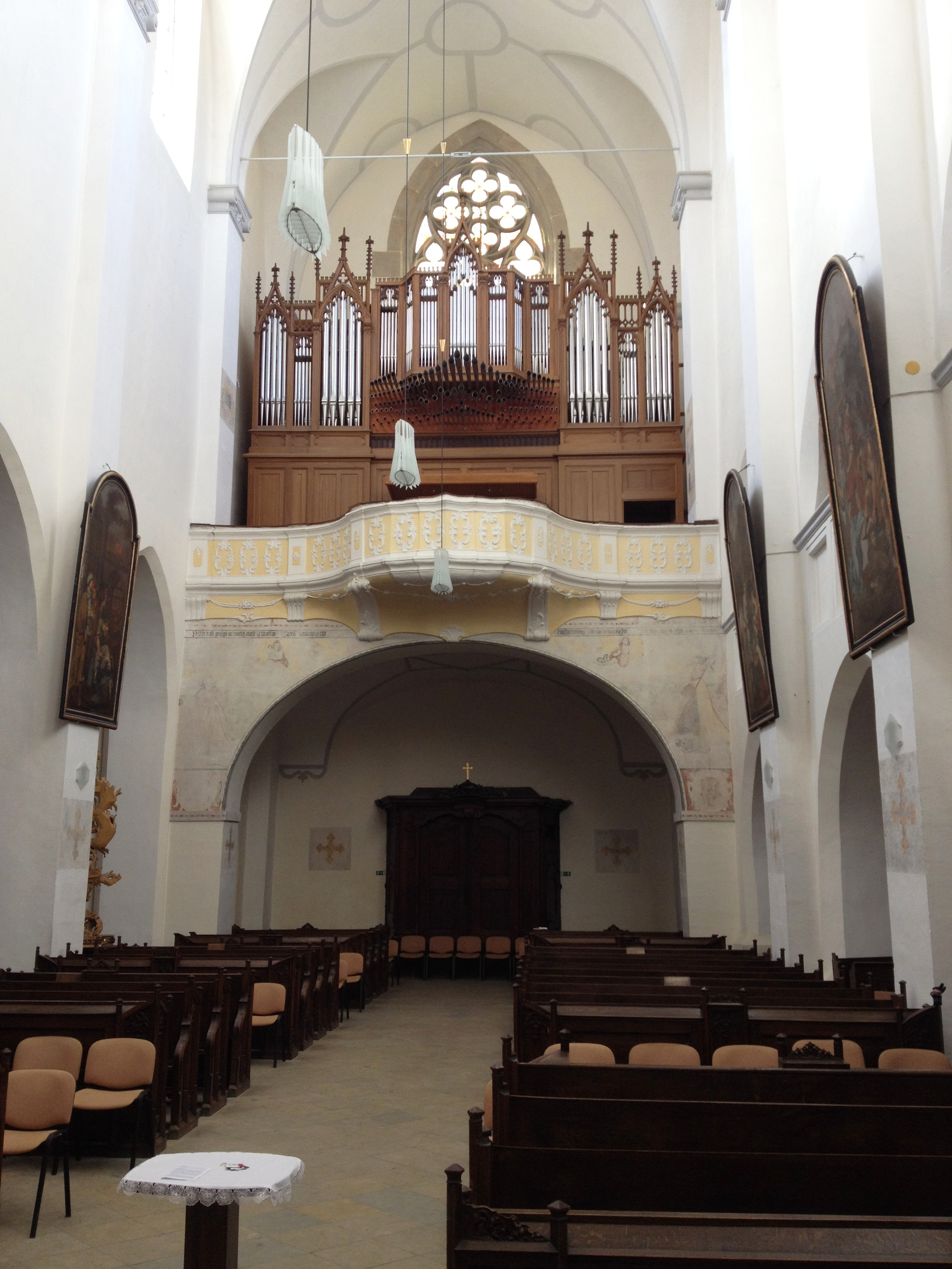 kostel Povýšení sv. Kříže, Litomyšl